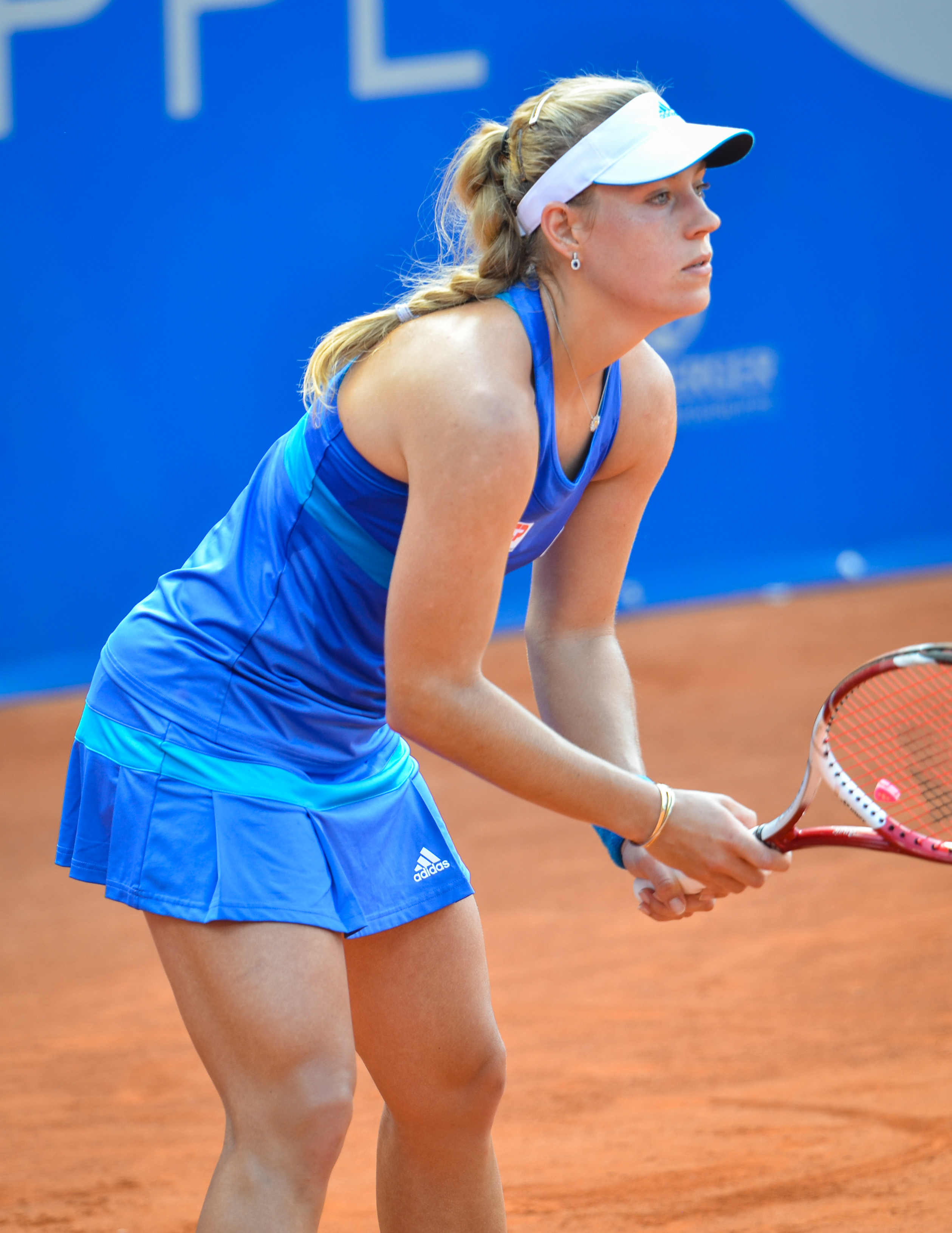 Angelique Kerber during her 1st round match against Marina Eraković at the 2014 Nürnberger Versicherungscup on May 20, 2014